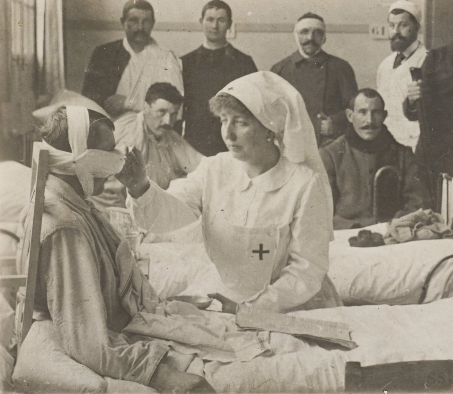 Henriette de Belgique durant la guerre 1914-1918